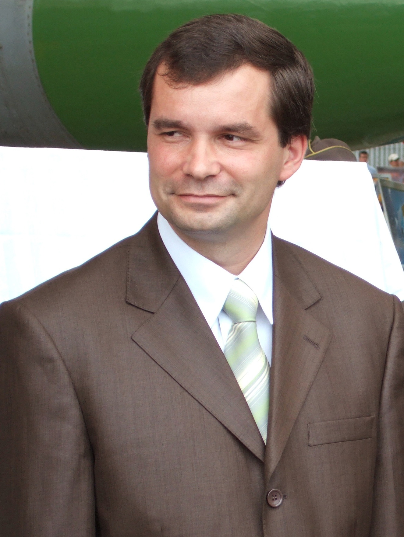 František Kašický, a Defense Secretary of Slovakia